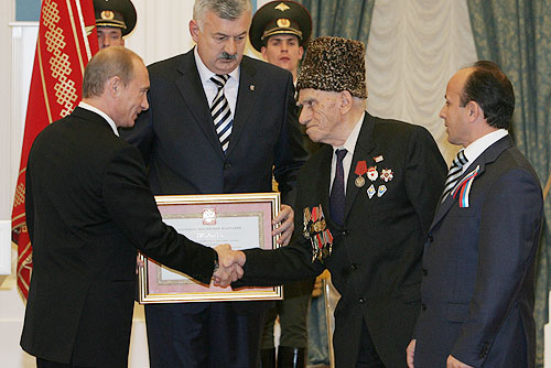 МОСКВА, КРЕМЛЬ. Грамота о присвоении Малгобеку почетного звания «Город воинской славы» вручена главе администрации города Махмутхану Алиханову (в центре).